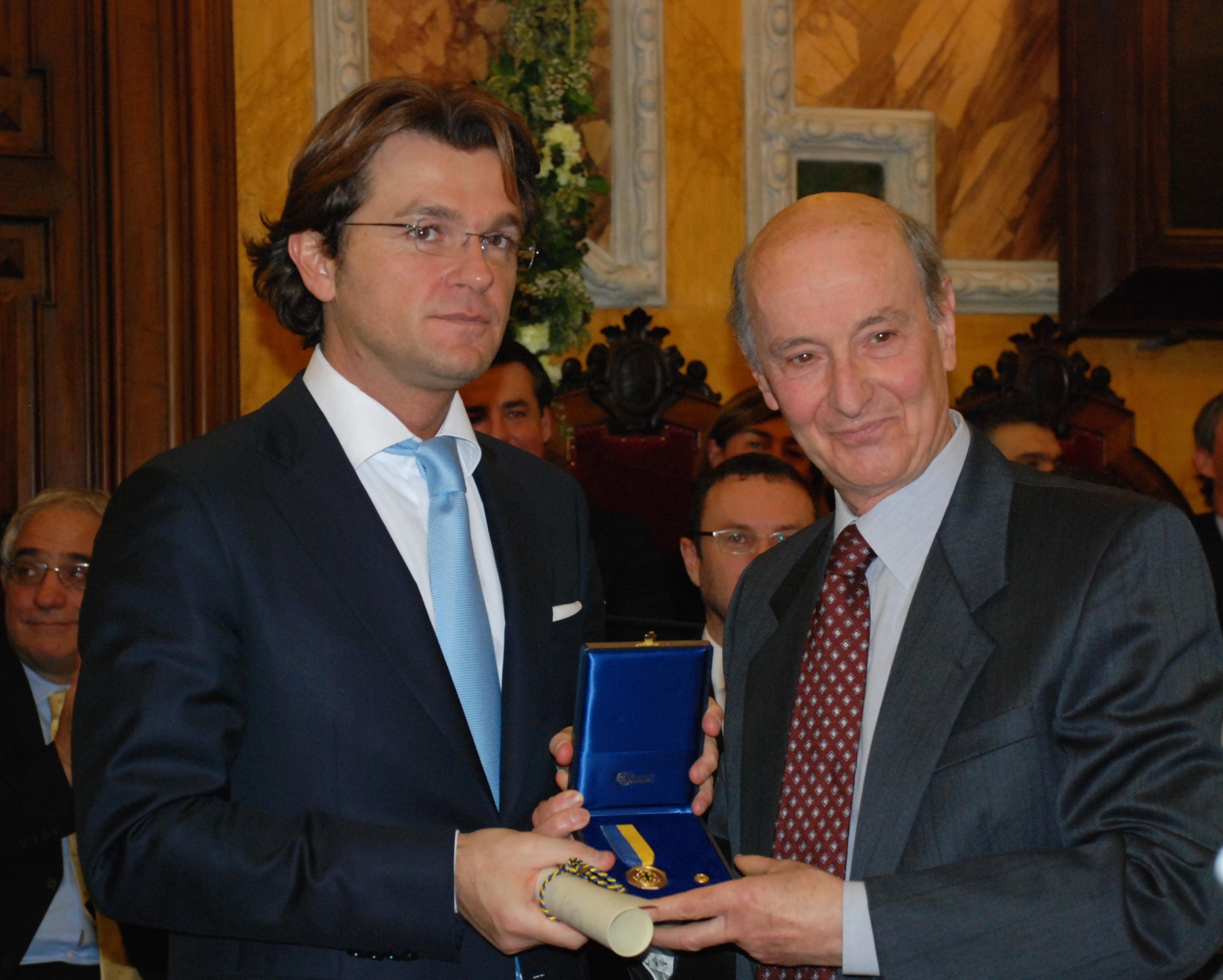 Giuseppe Marchetti riceve il premio Sant'Ilario 2010 dal sindaco di Parma Pietro Vignali.